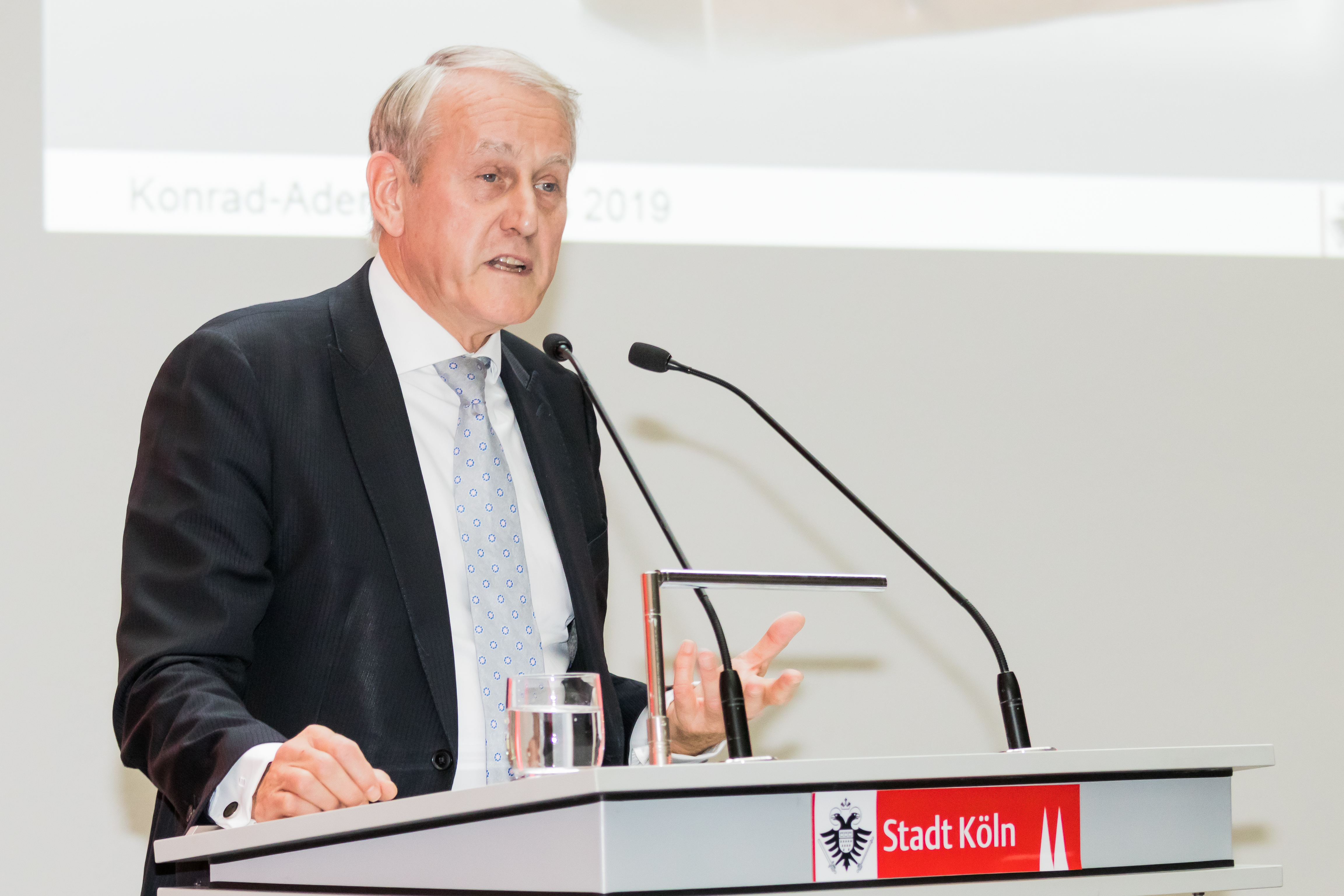 Verleihung Konrad-Adenauer-Preis der Stadt Köln 2019 an Daniel Barenboim Foto: Louwrens Langevoort, Intendant der Kölner Philharmonie, hält die Laudatio